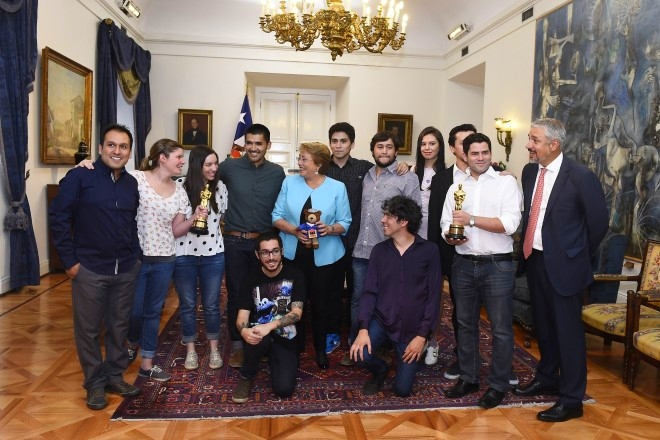 La Presidenta de la República, Michelle Bachelet, junto al ministro de Cultura, Ernesto Ottone recibió a los creadores del cortometraje “Historia de un Oso”, Gabriel Osorio y Patricio Escala, quienes el domingo 28 de febrero recibieron el primer Oscar a una producción audiovisual creada en Chile por realizadores nacionales.